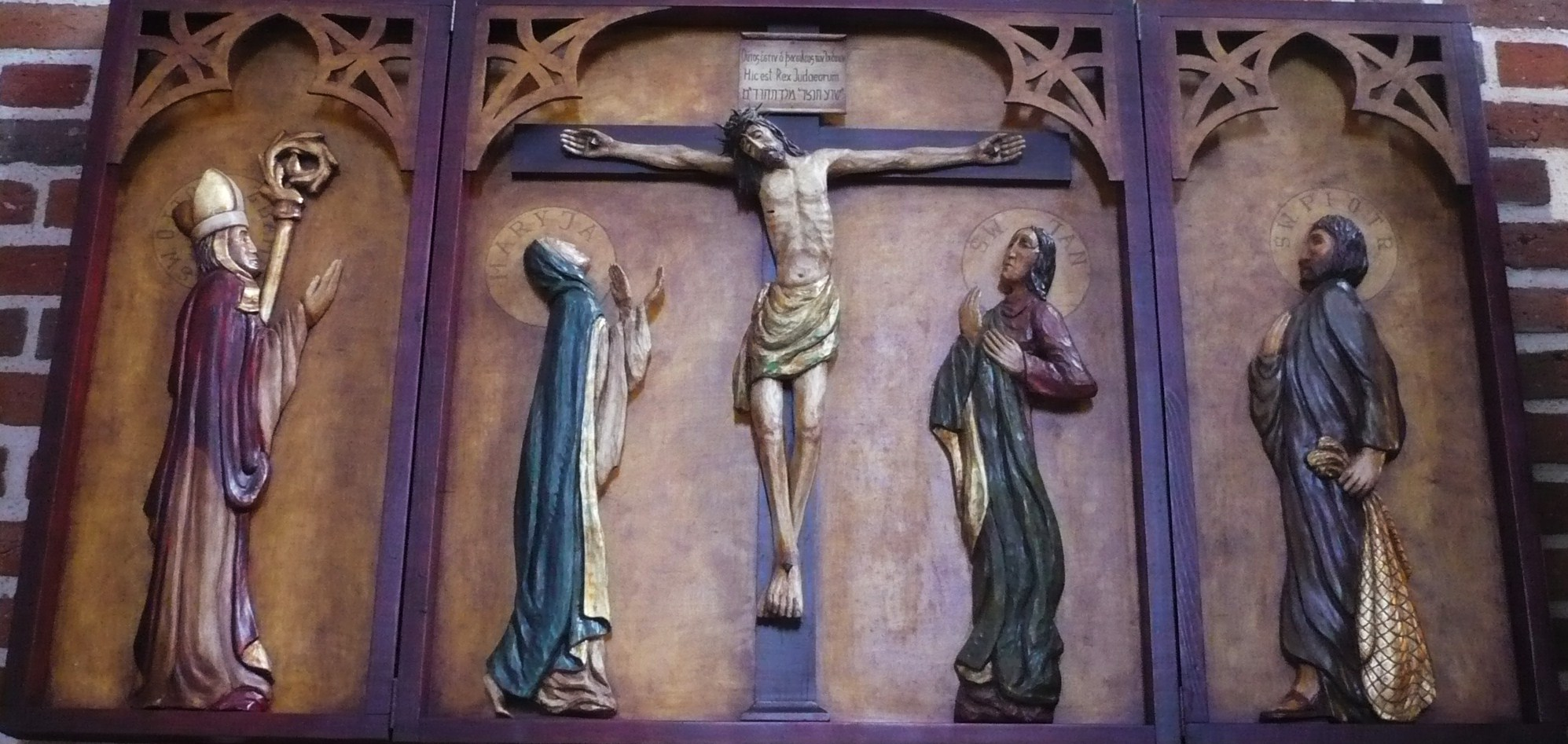 Trzebiatów. Tryptyk w kościele mariackim